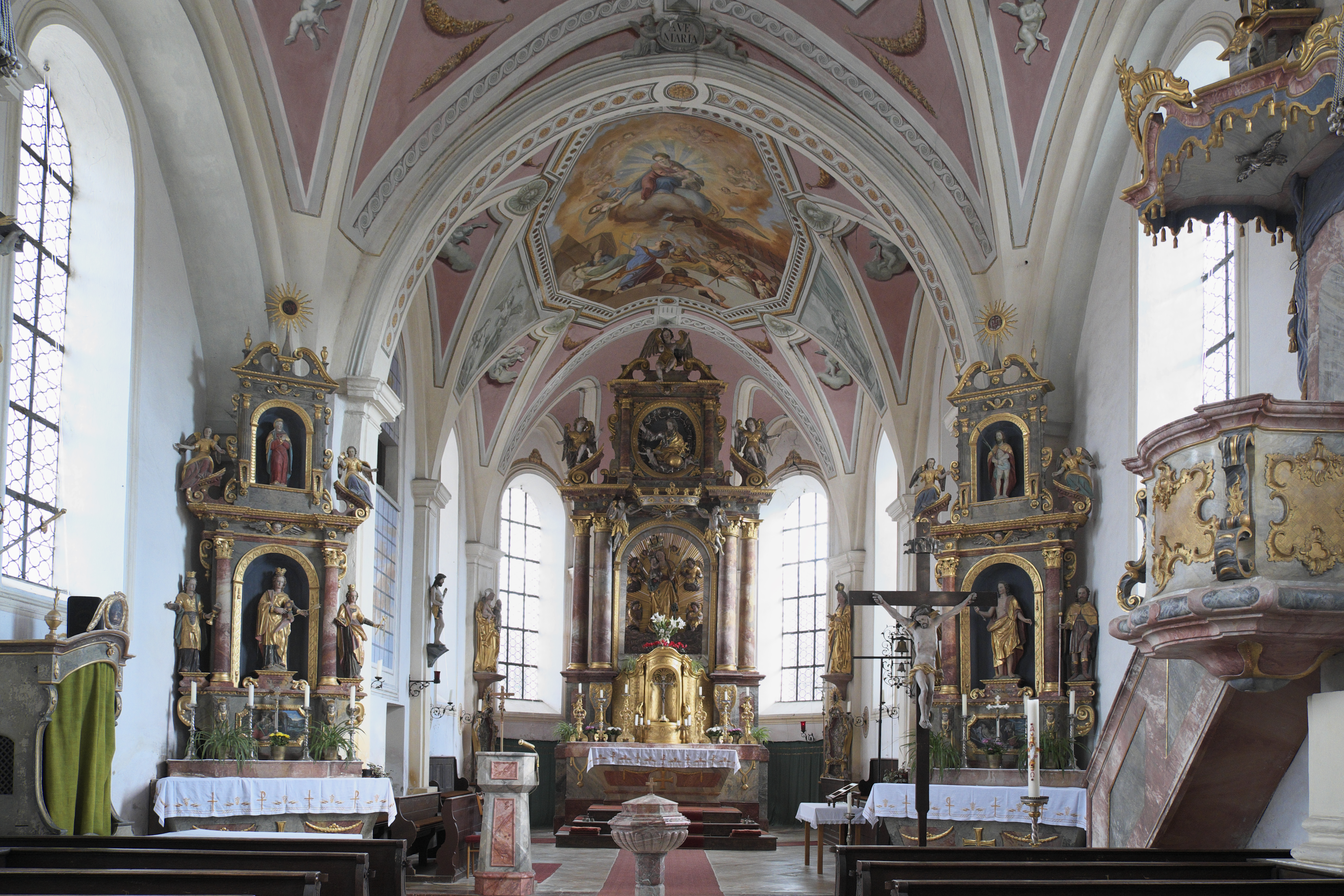 Katholische Filialkirche Mariä Himmelfahrt in Lampferding (Tuntenhausen) im Landkreis Rosenheim (Bayern/Deutschland), Innenraum